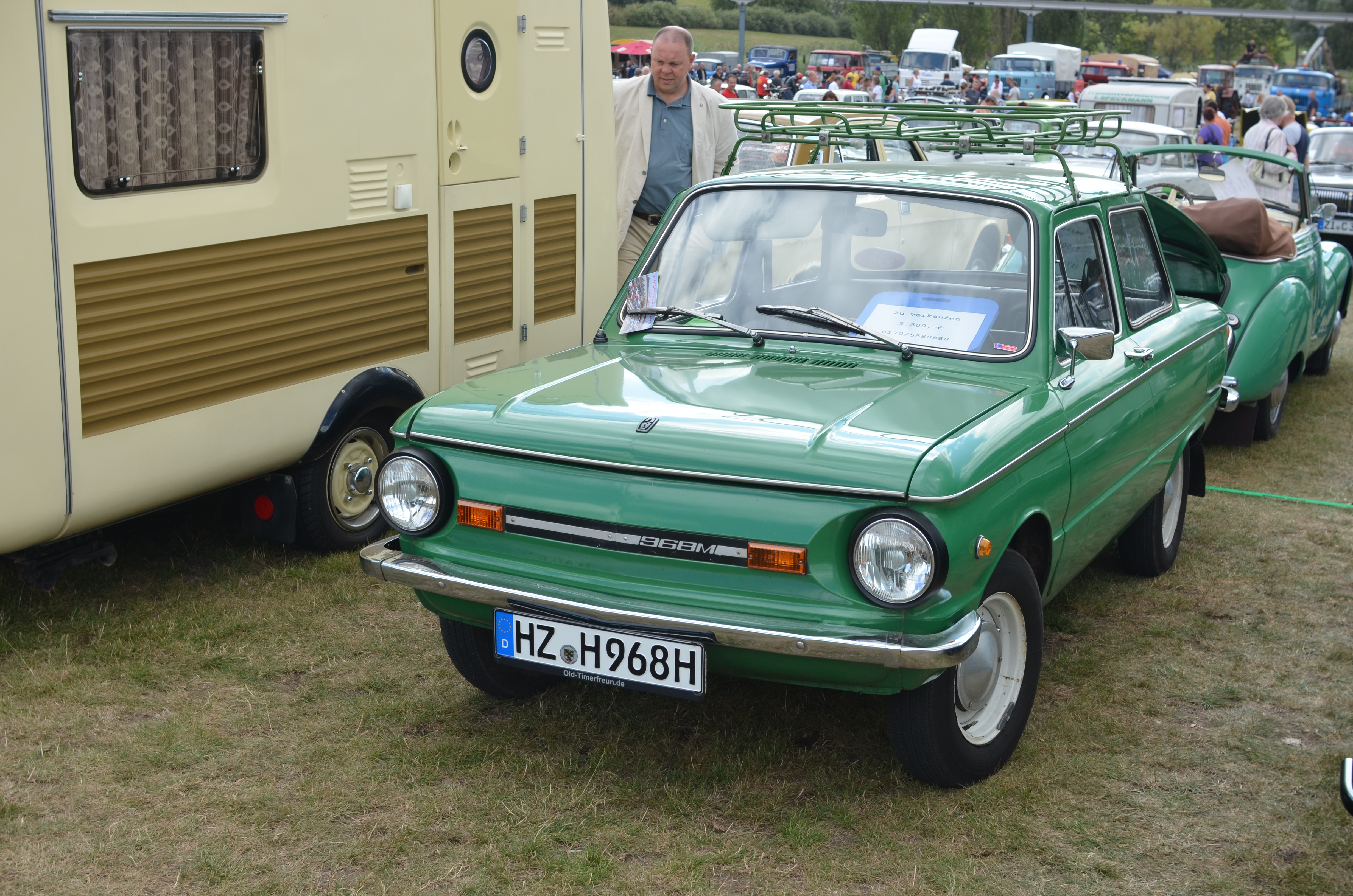 Saporosh